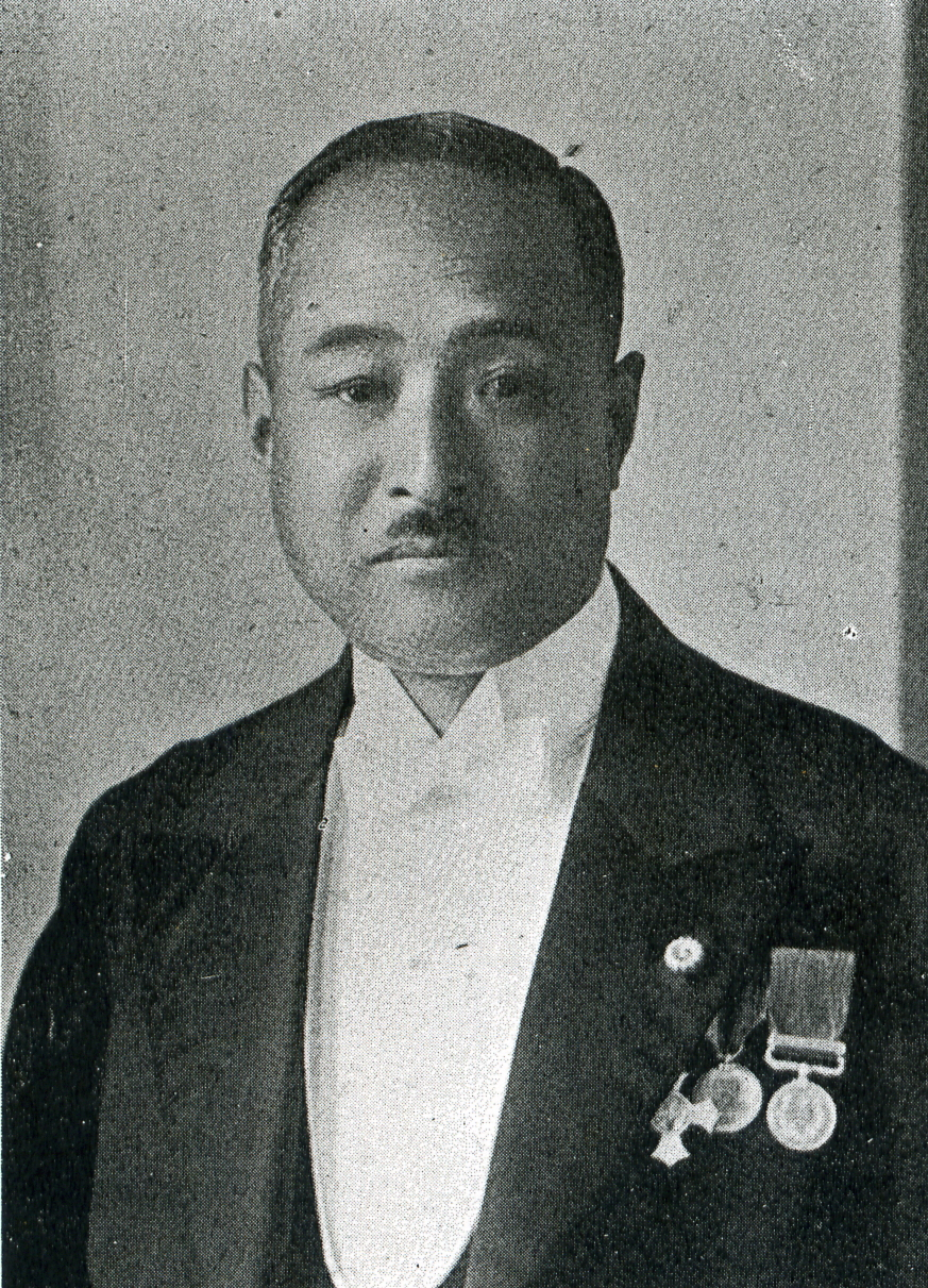 この写真は、林七六（1875-1950）の写真です。